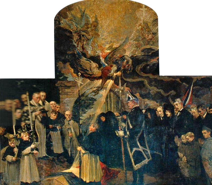 Mémorial en hommage aux soldats morts pour la France. Peinture sur toile de Jacques-Émile Blanche dans l'église d'Offranville (Seine-Maritime). Largeur au moins 4 mètres (?). Les personnes représentées sont des habitants de la commune.